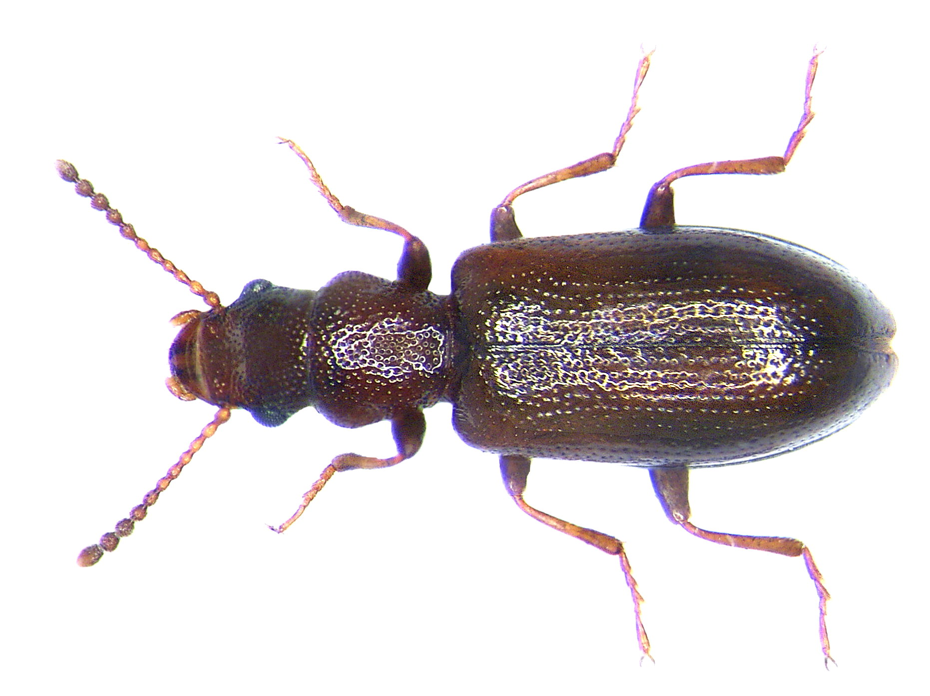 Familie: Salpingidae Grösse: 3-3,3 mm Verbreitung: Europa Ökologie: an Nadelhölzern unter Rinde; Ipidenfresser Fundort: Germania, Bayern, Pressath leg.det. G.Uhmann, 1969 Foto: U.Schmidt, 2006